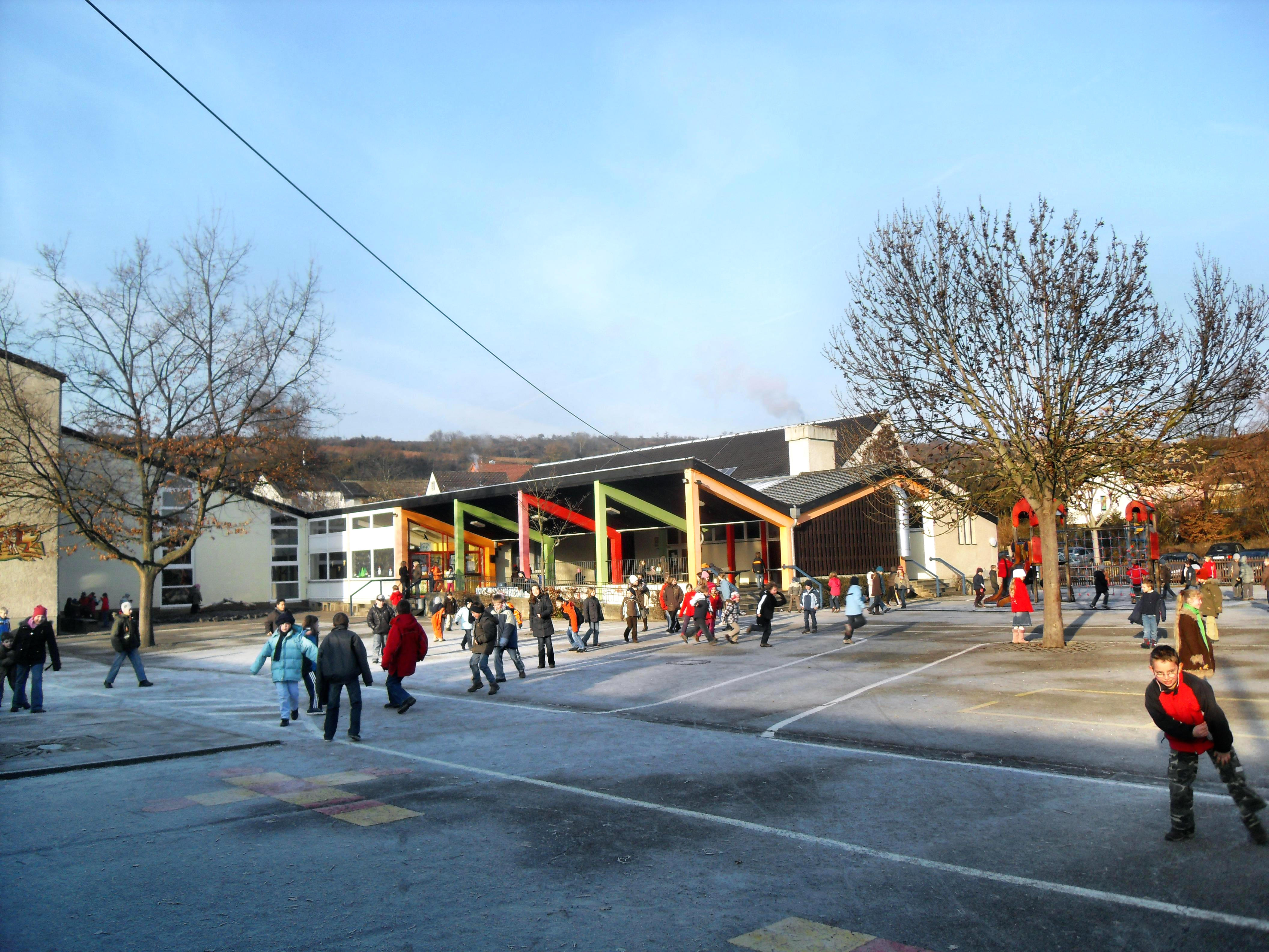 Die Carl-Küstner-Grundschule in Guntersblum (Rheinland-Pfalz) von außen